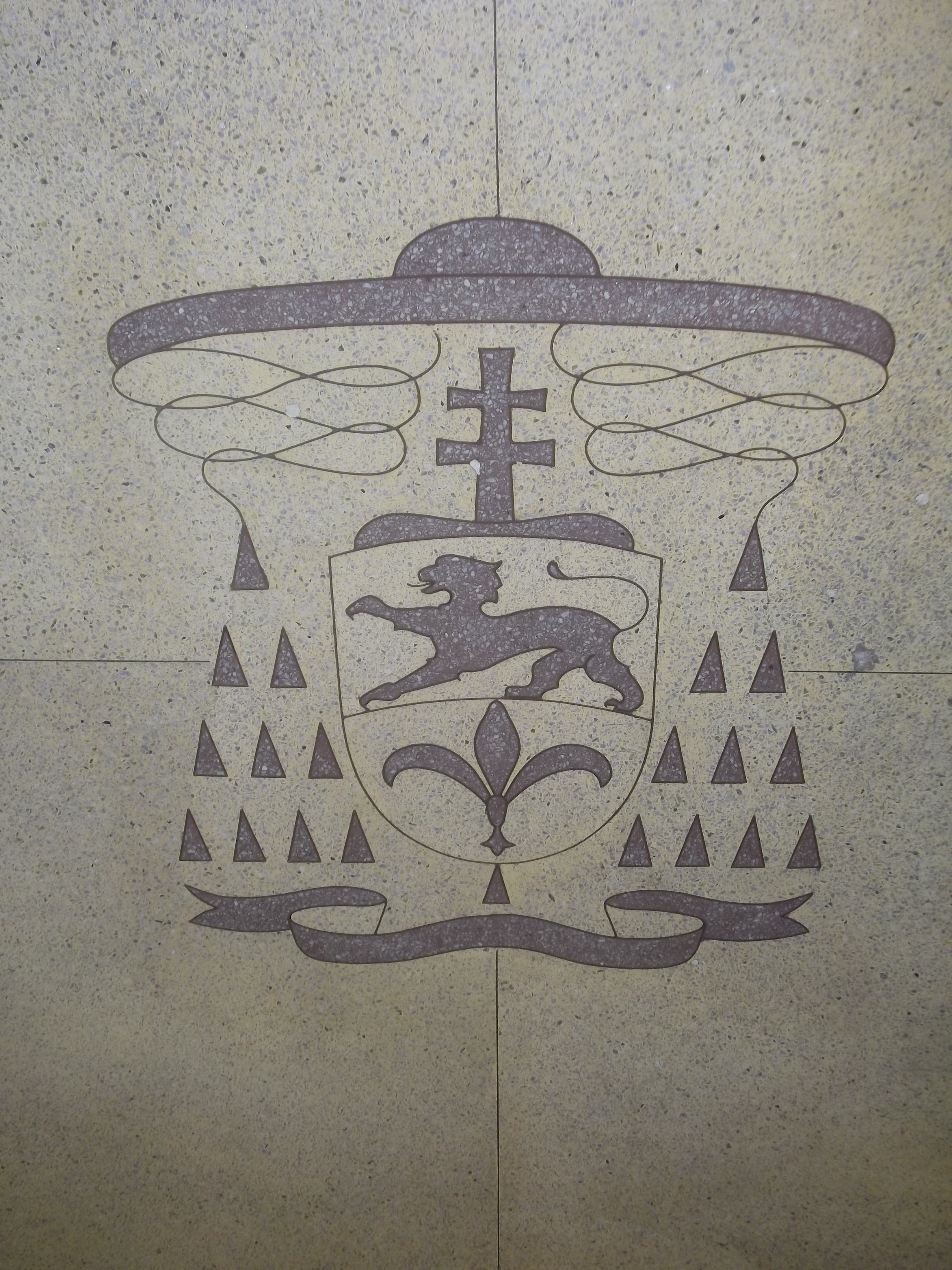 Brasão arquiepiscopal de D. Vicente Scherer no piso do Presbitério da Igreja São Francisco de Assis em Porto Alegre